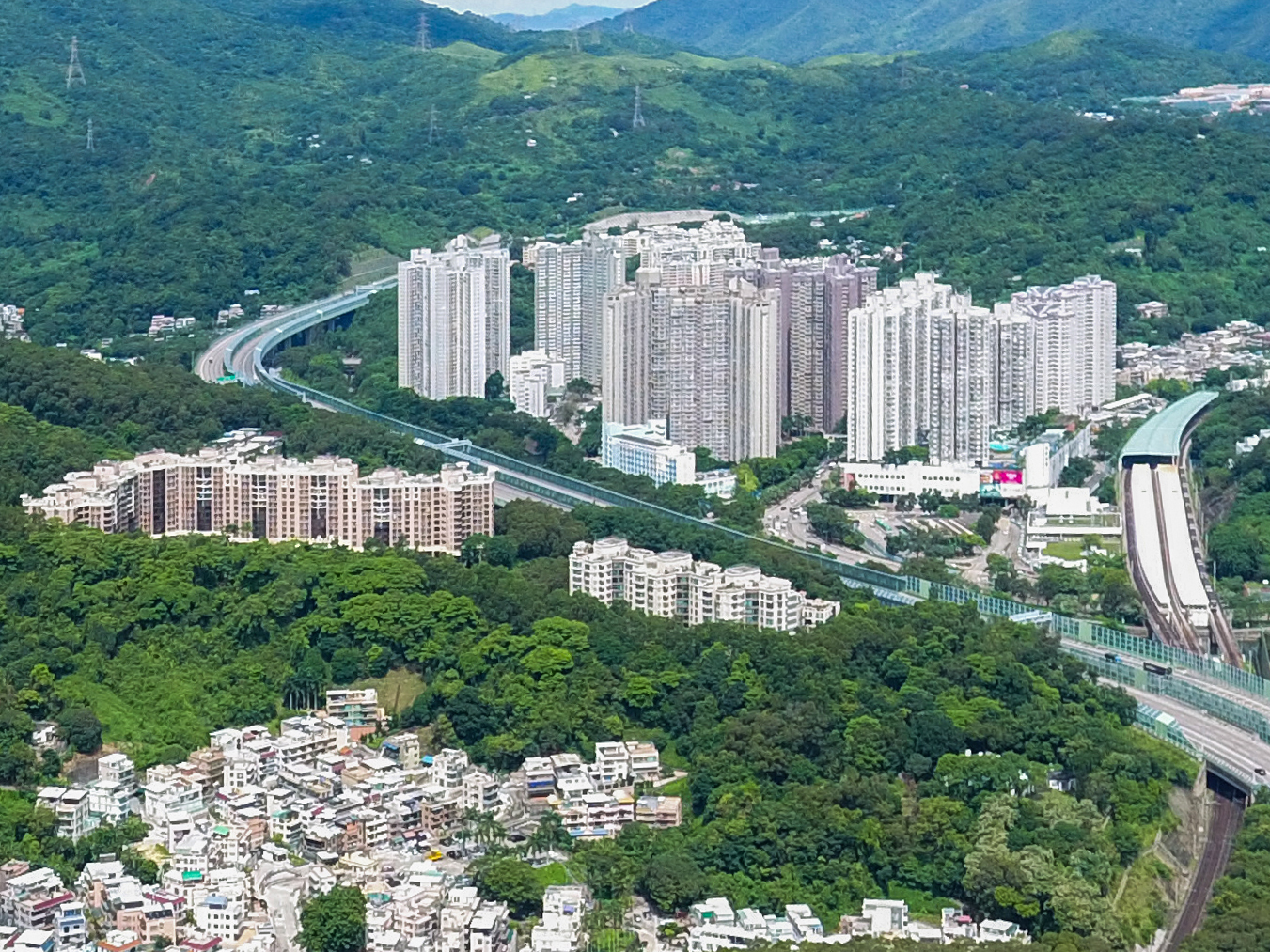 Wan Tau Tong